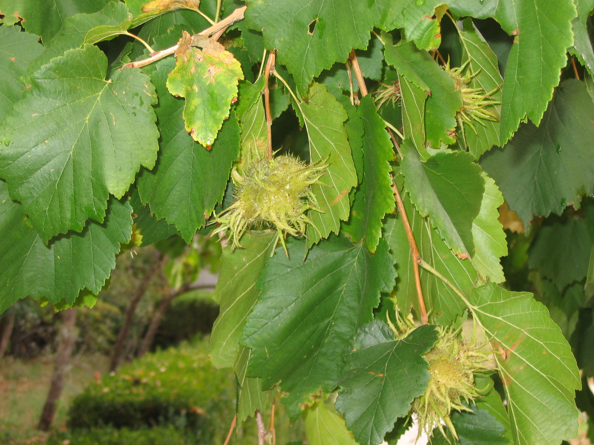 Törökmogyoró (Corylus colurna L.) levele és termése (Fertőrákos, a püspöki palota parkjában)